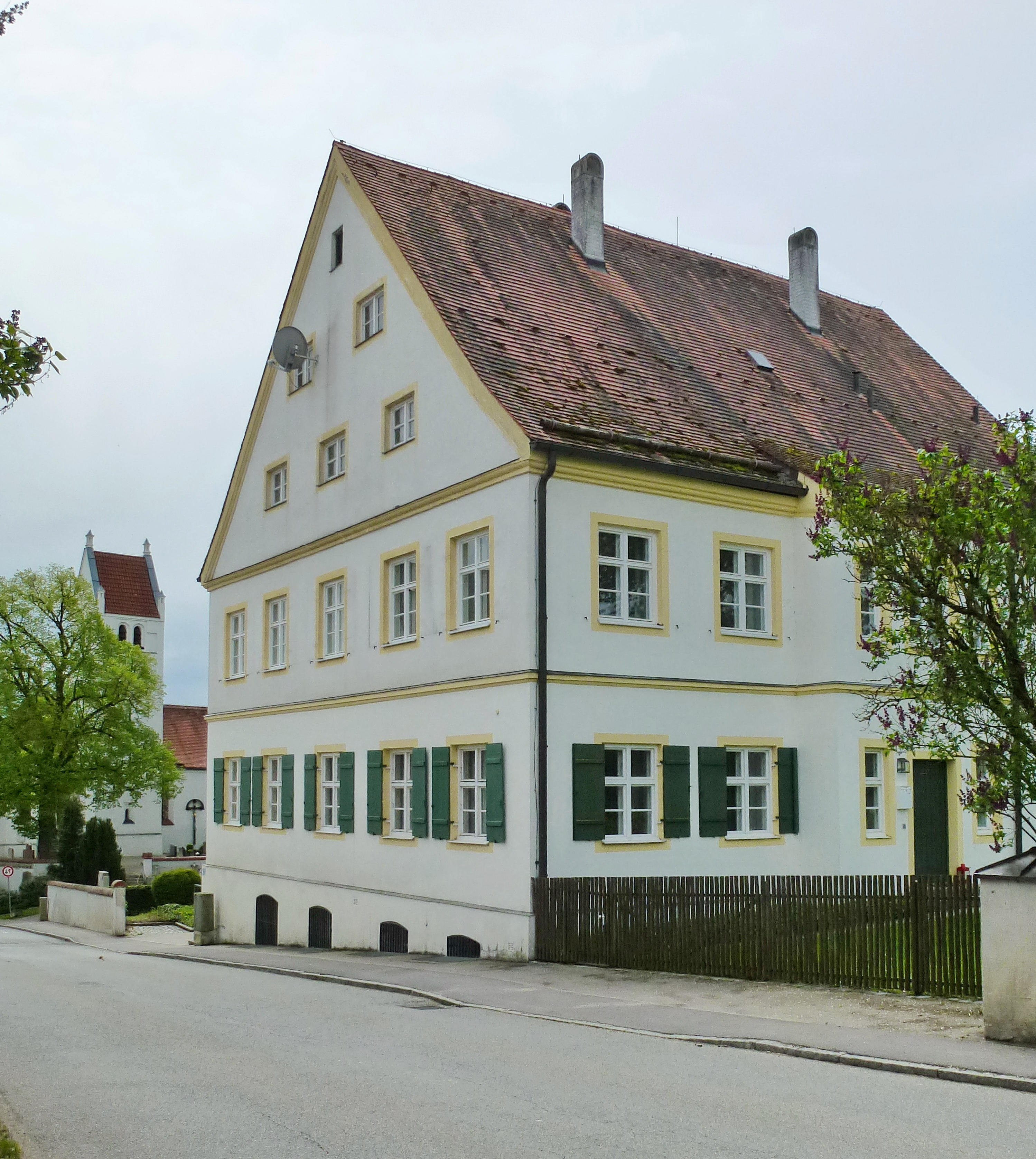 Arnbach (Gde Schwabhausen), Indersdorfer Str.5 Ehem Pfarrhaus. Ansicht von NO